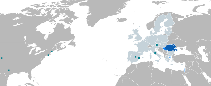 Limba română în Atlanticul de Nord / Romanian language at the Northern Atlantic